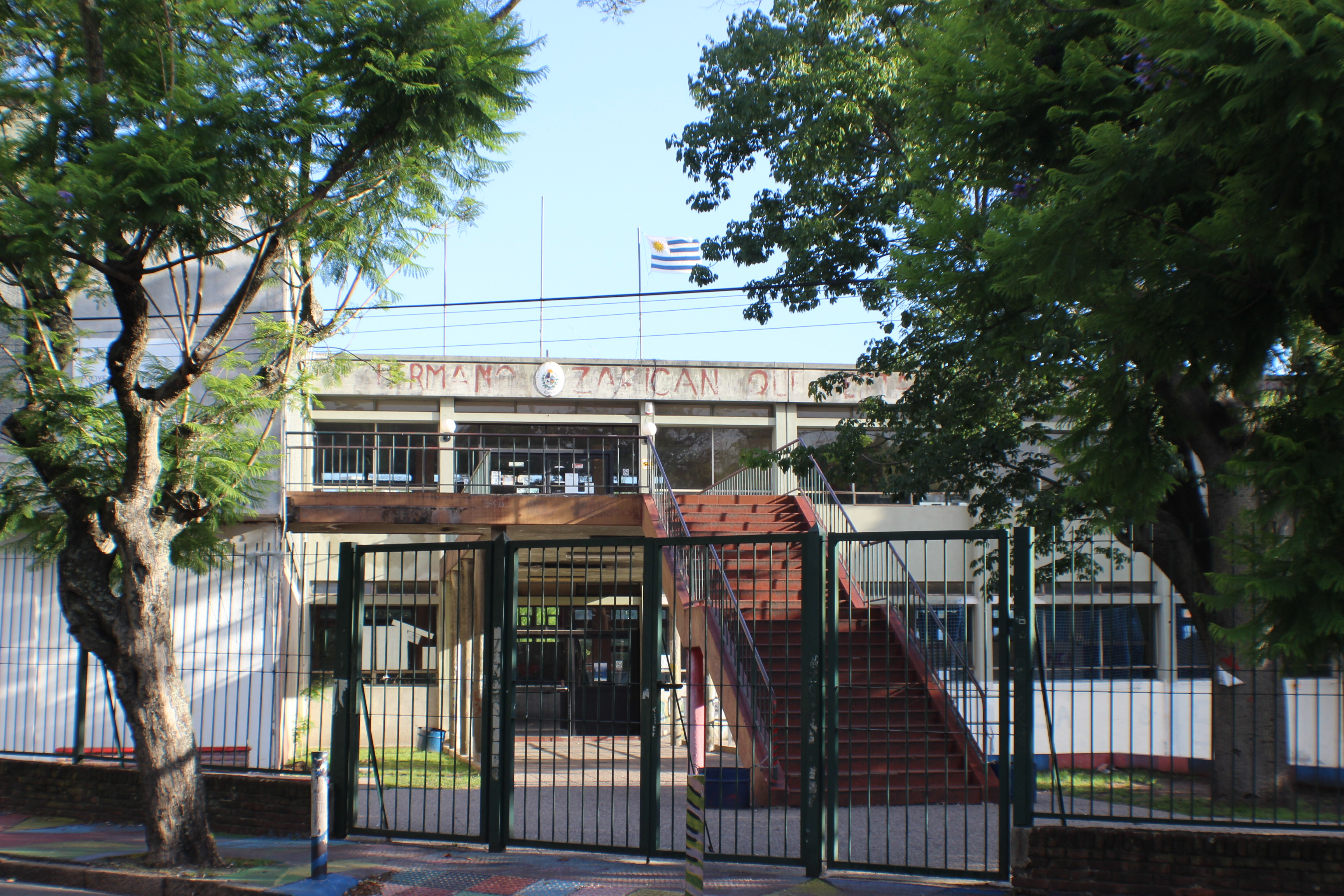 Liceo Francisco Bauzá